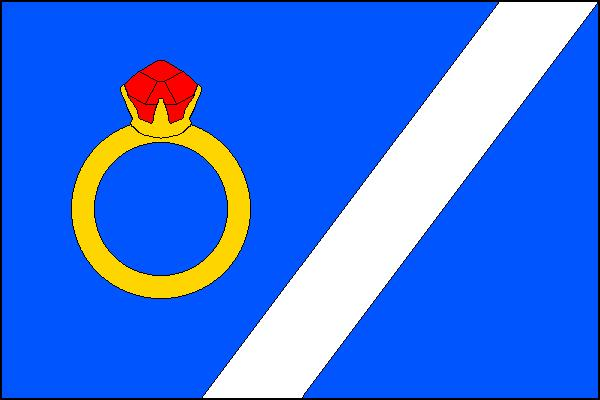 Vlajka obce Otmarov